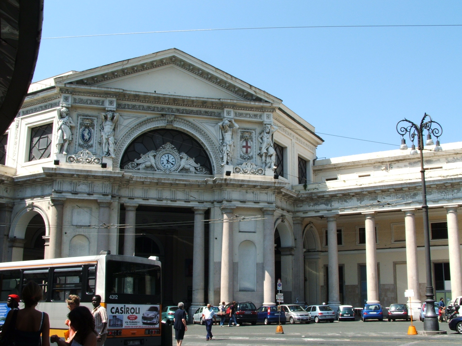 Immagine dalla città di Genova Stazione ferroviaria di piazza Acquaverde (Piazza Principe)